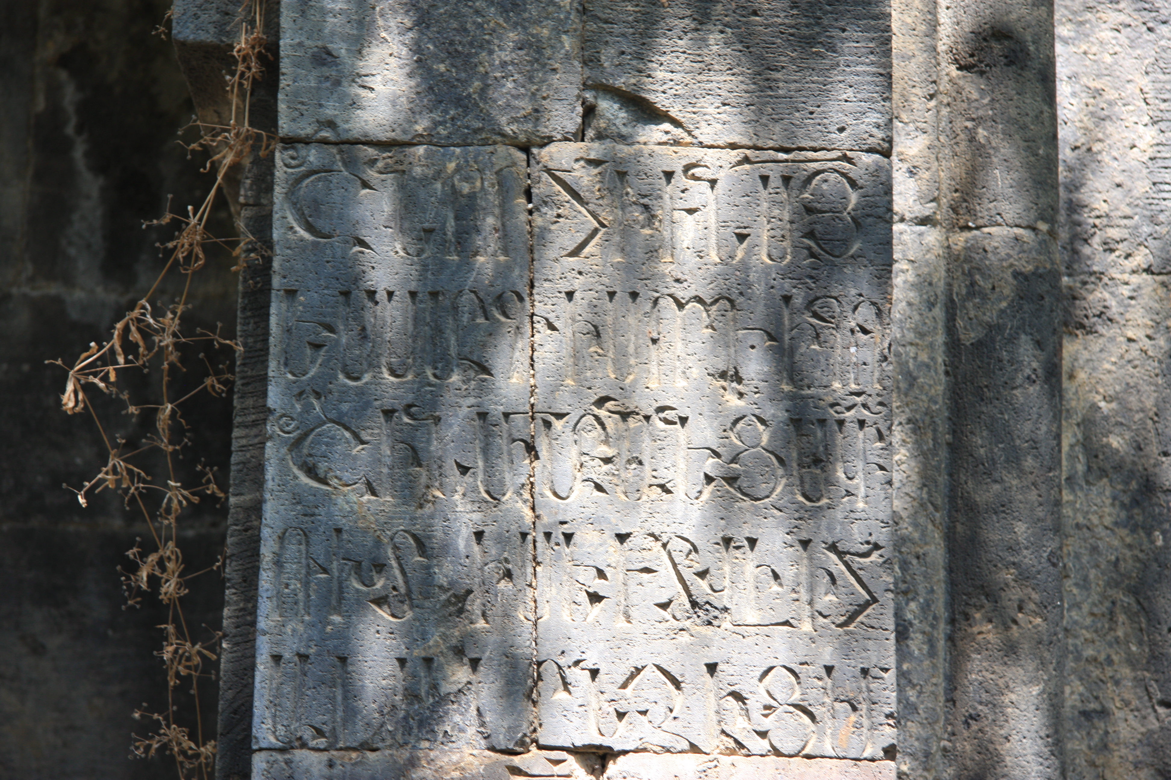 Եկեղեցական համալիր «Գհուկի վանք» (Բոլորահար) 15/6